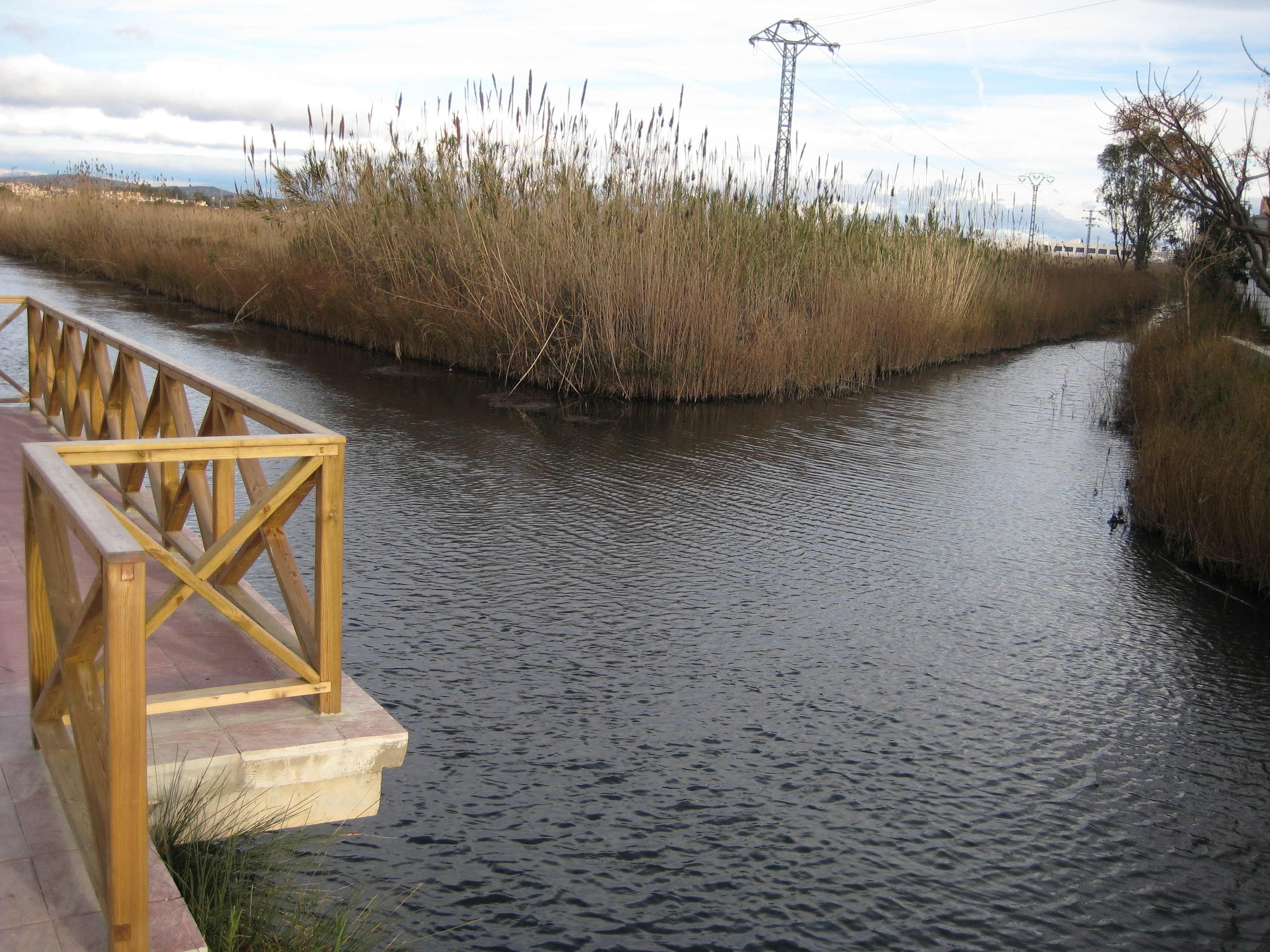 Acabament de la séquia Sangonera, a la avinguda Pigmalió de Peníscola (Baix Maestrat)